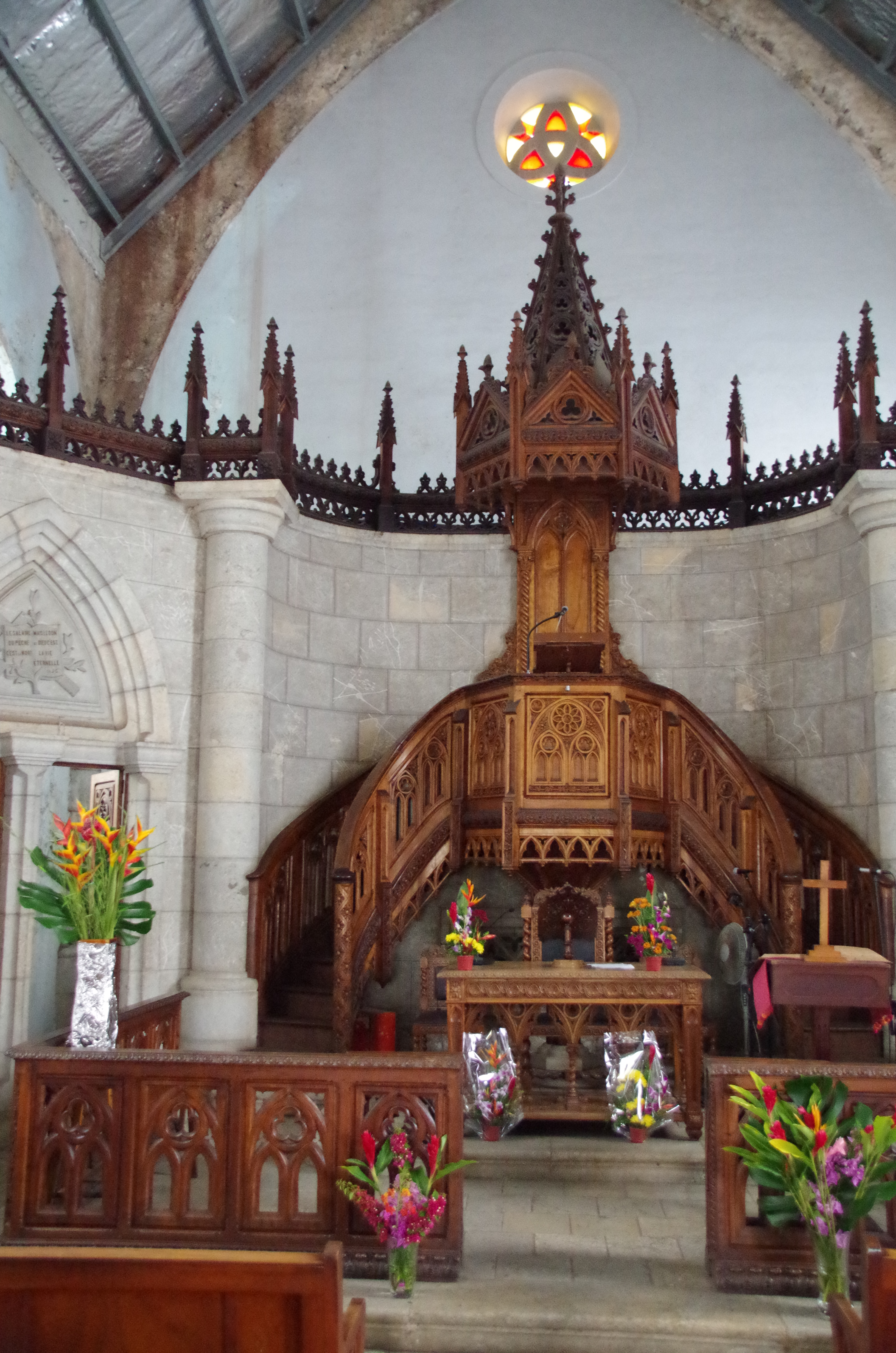 Protestantische Kirche Nouméa